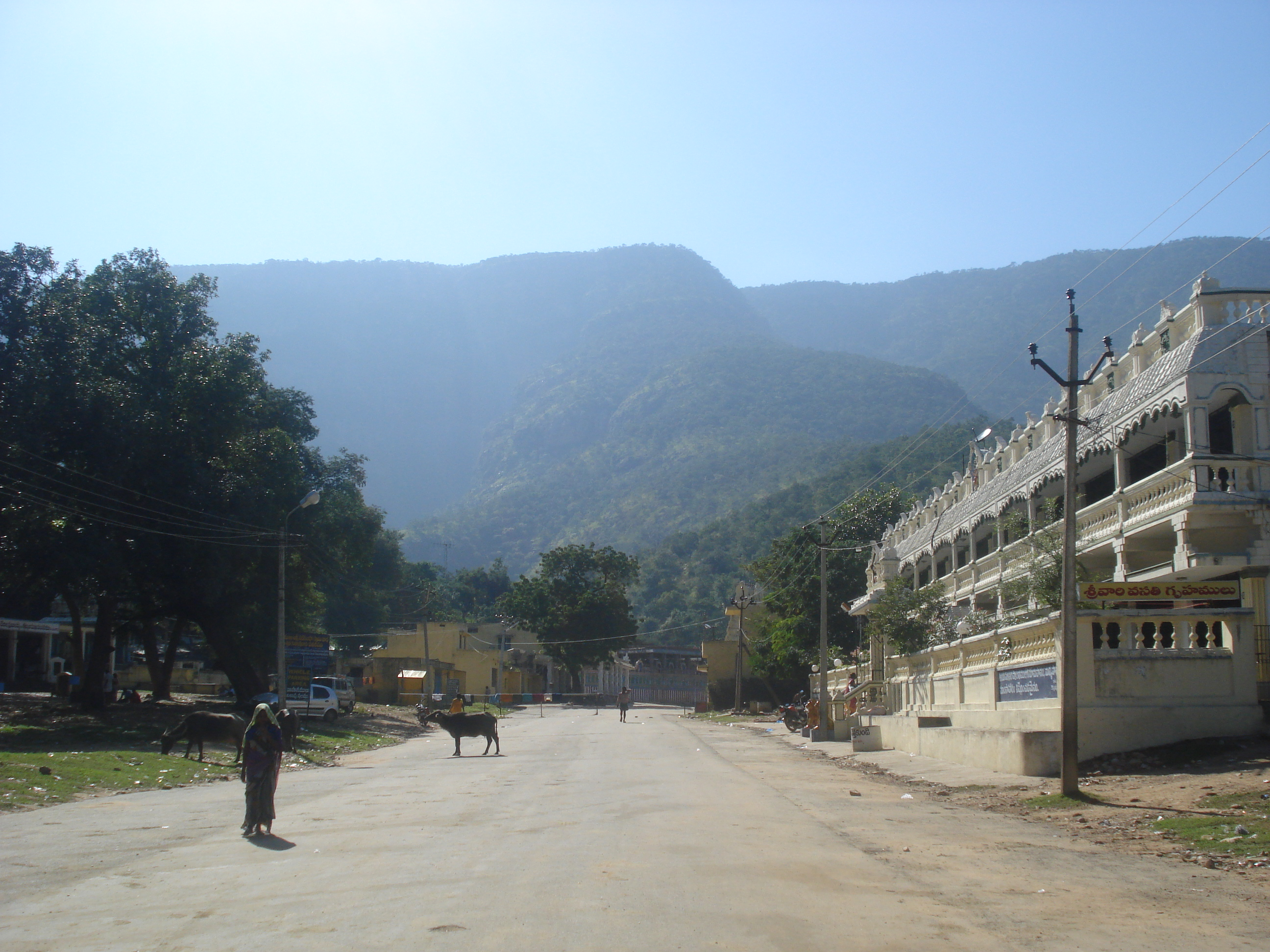 Penchalakona place